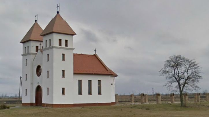 Alsószenttamási Szent Jobb Lator templom (Tass, Bács-Kiskun megye)